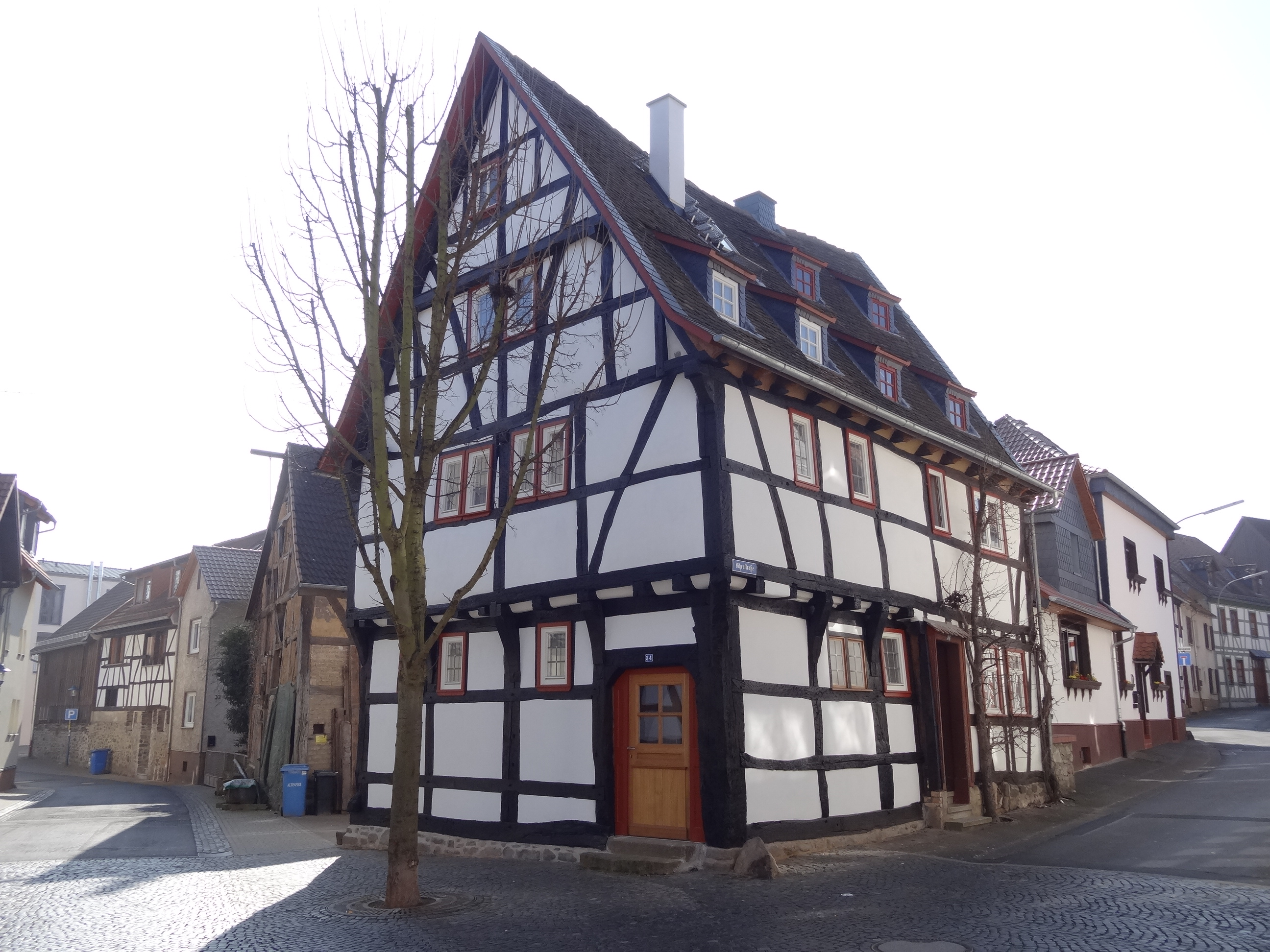 Blitzenstraße 34-36 (Hungen)